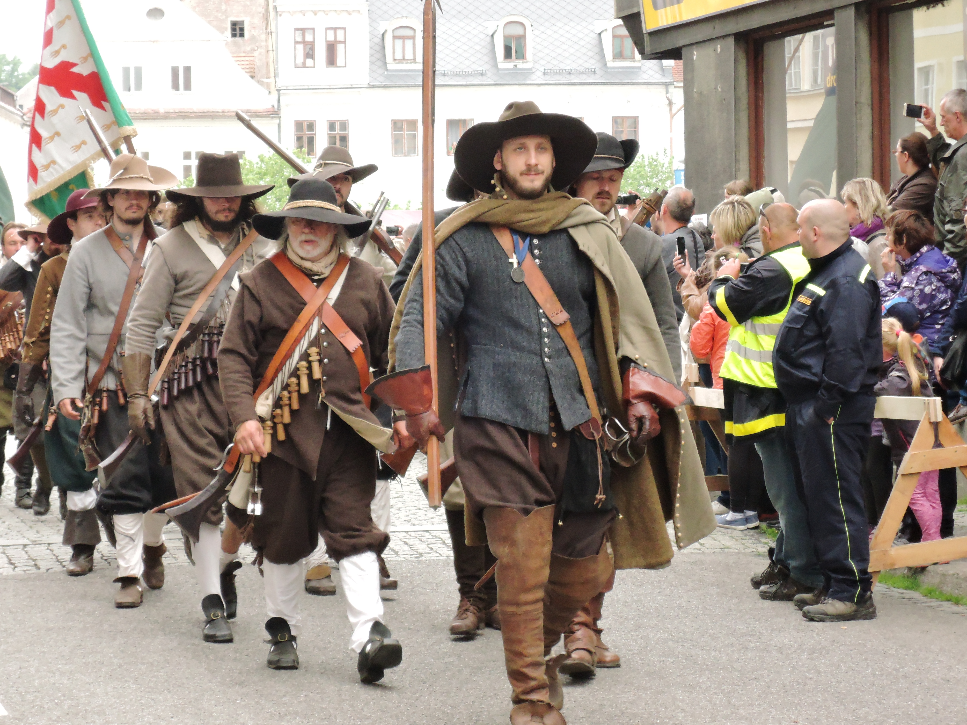 Frýdlant, Valdštejnské slavnosti 2017